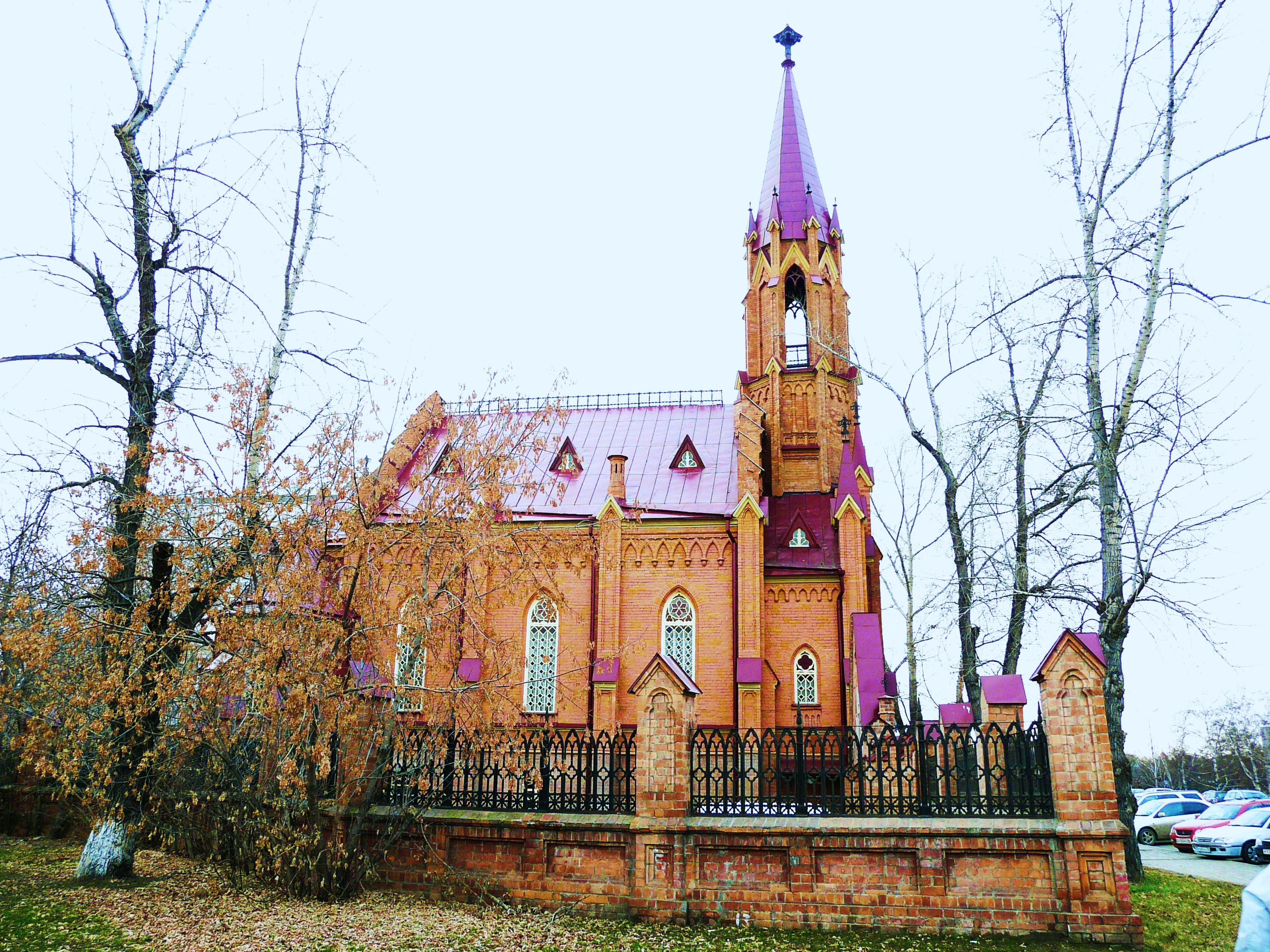 Снимок сделан утром.